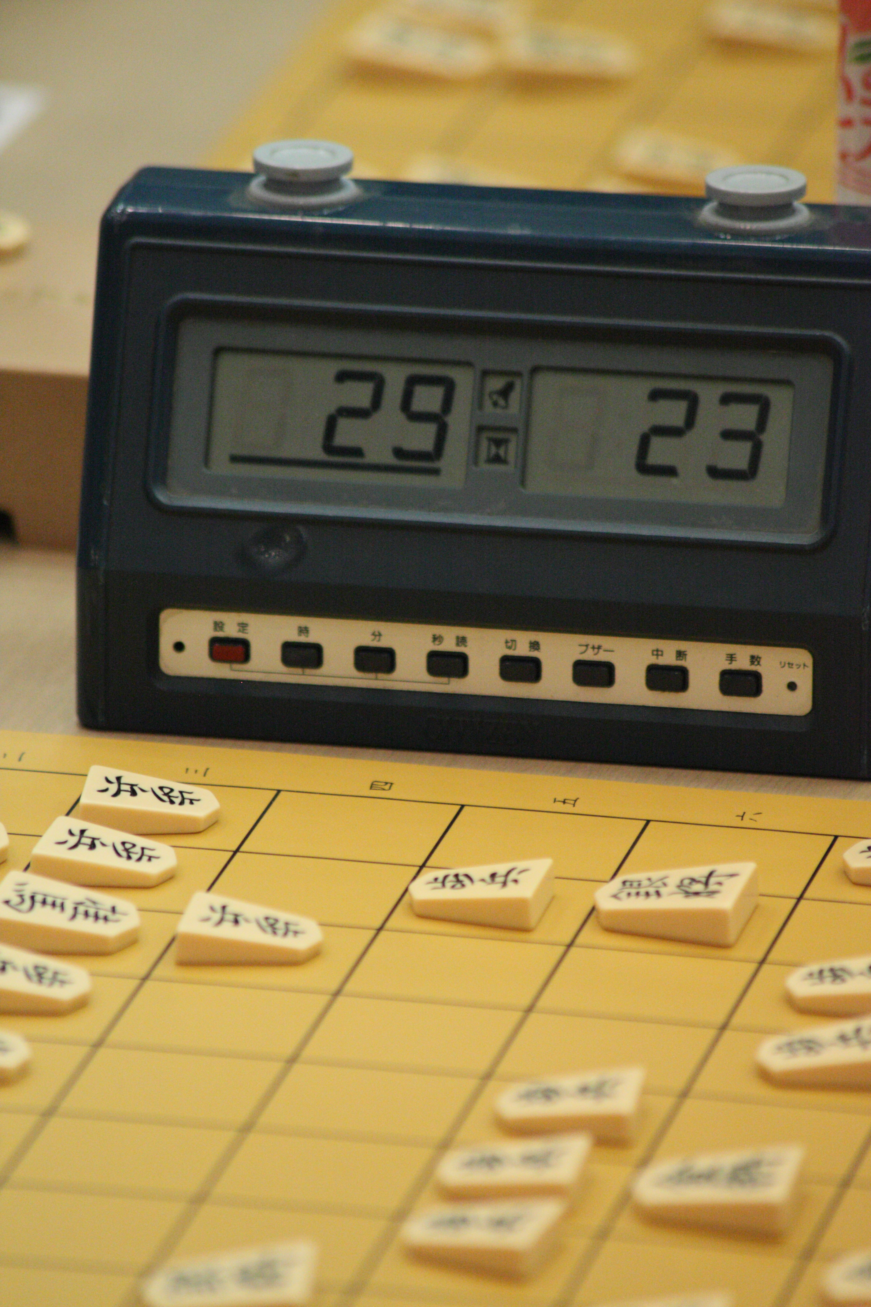 チェスクロック